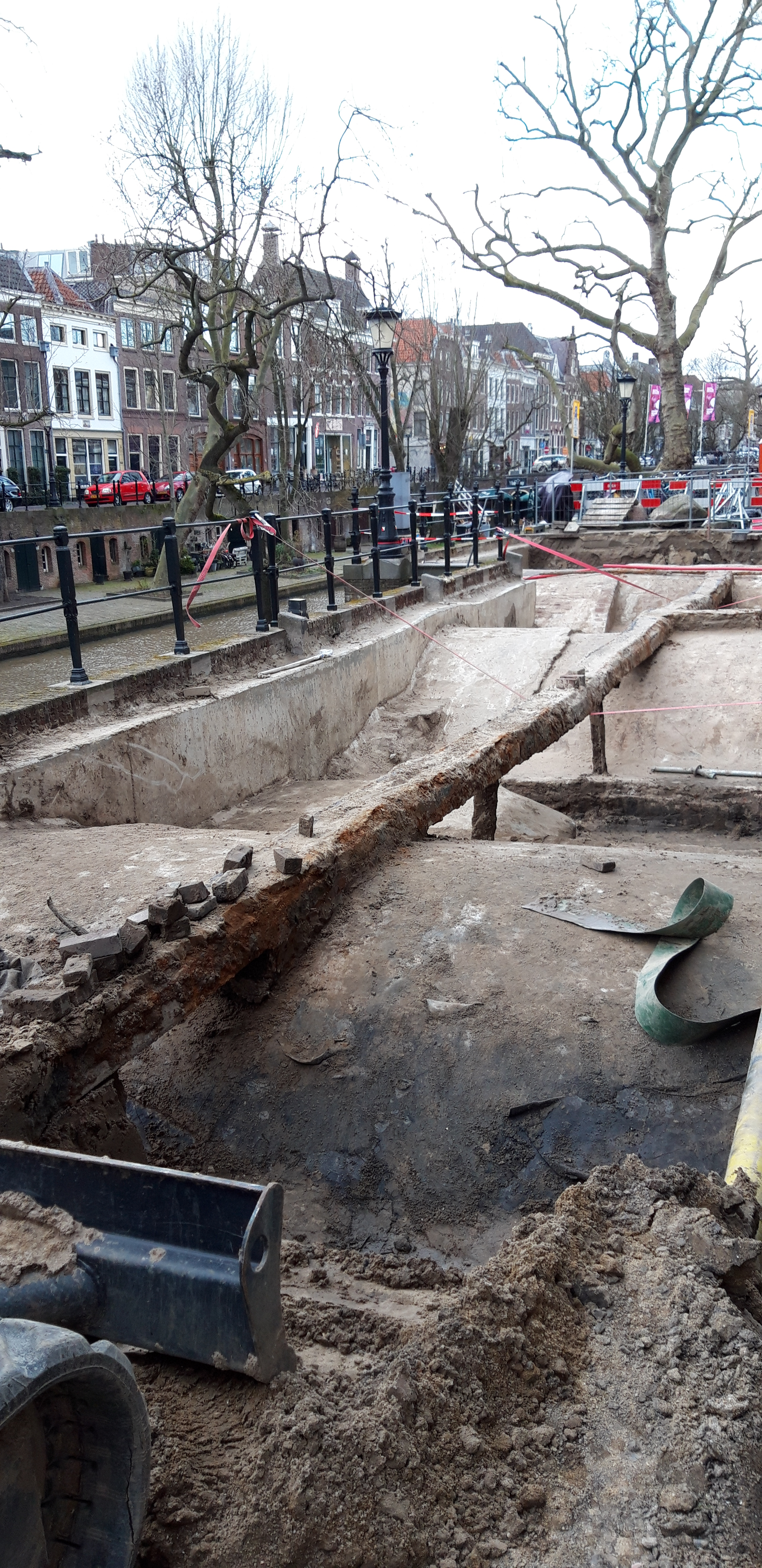 bovenkant werfkelders utrecht. Het tongewelf boven de werfkelders is tijdens een opbreking van de straat langs de Oude Gracht zichtbaar